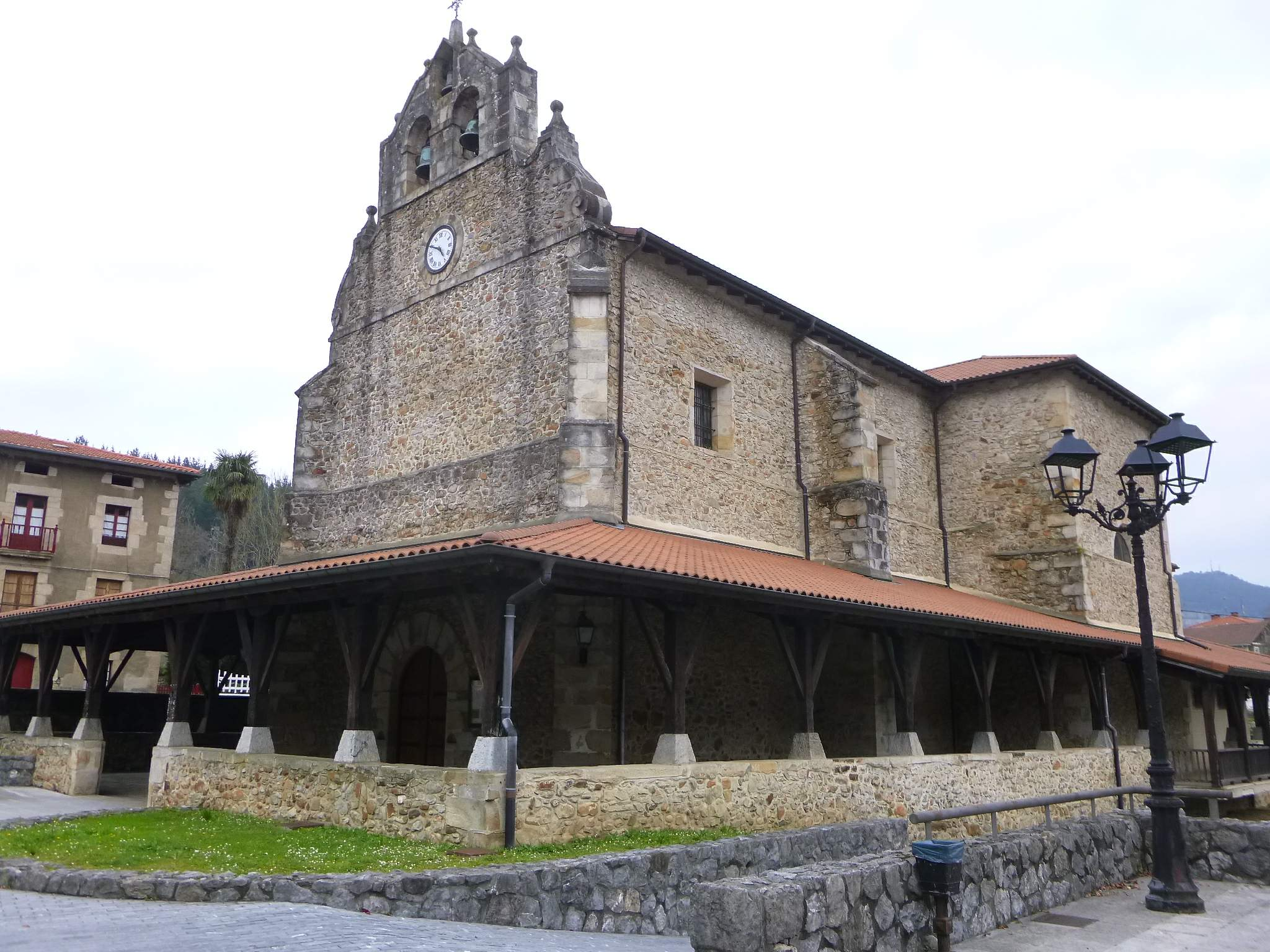 Iglesia de San Juan Bautista (Bedia, Bizkaia)